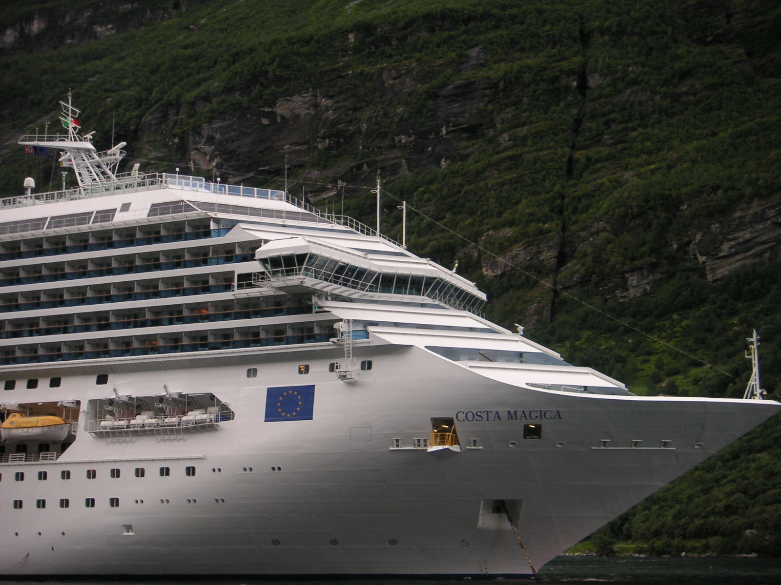 MS Costa Magica vor Geiranger, Norwegen